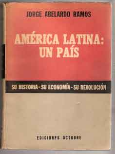 Tapa del libro América Latina, un País